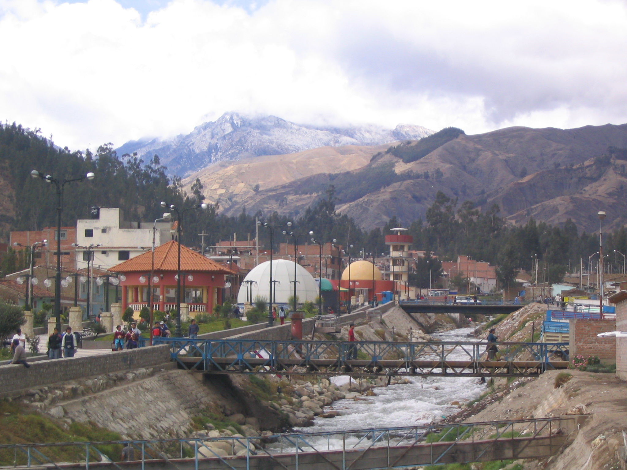 Río Quilcay in Huaraz